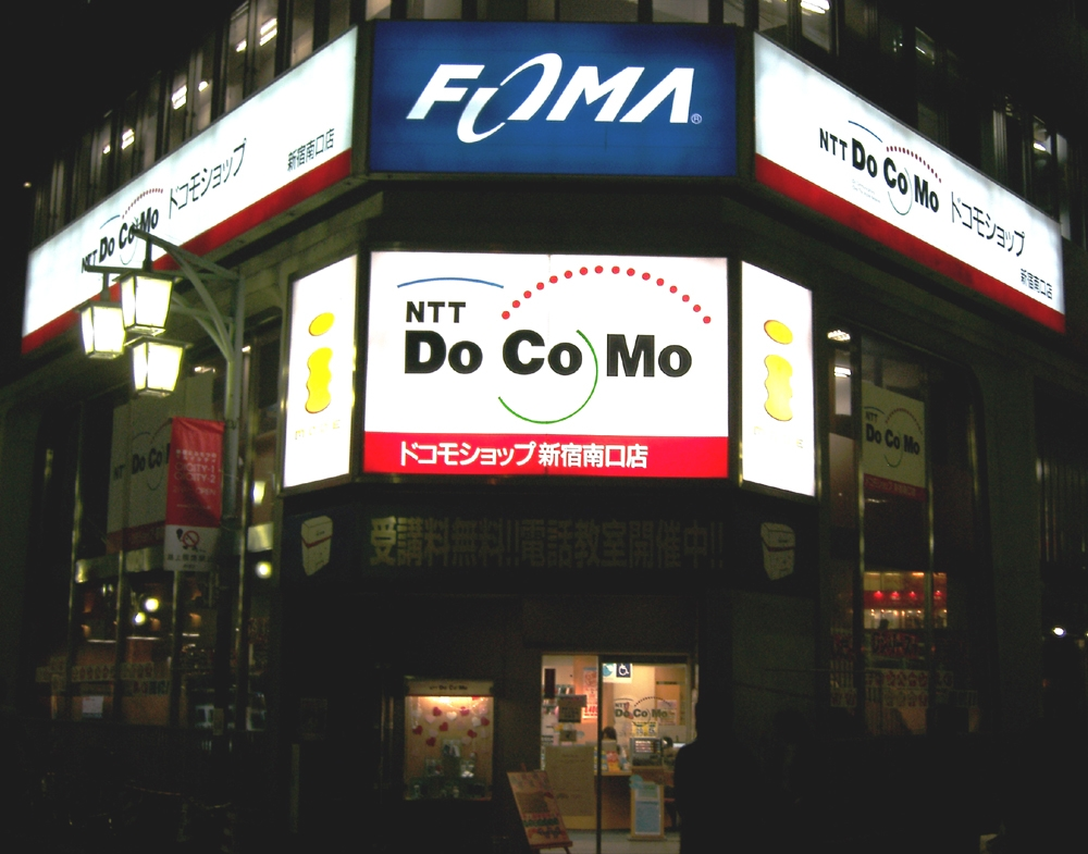 Au_Mobile_Shop_Shinjuku,_Tokyo Japan